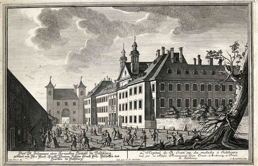 Salzburg, Johannesspital, aus: Die Saltzburgische Kirchen-Prospect. Augsburg, 1735. Exemplar der Universitätsbibliothek Salzburg, G 500 I